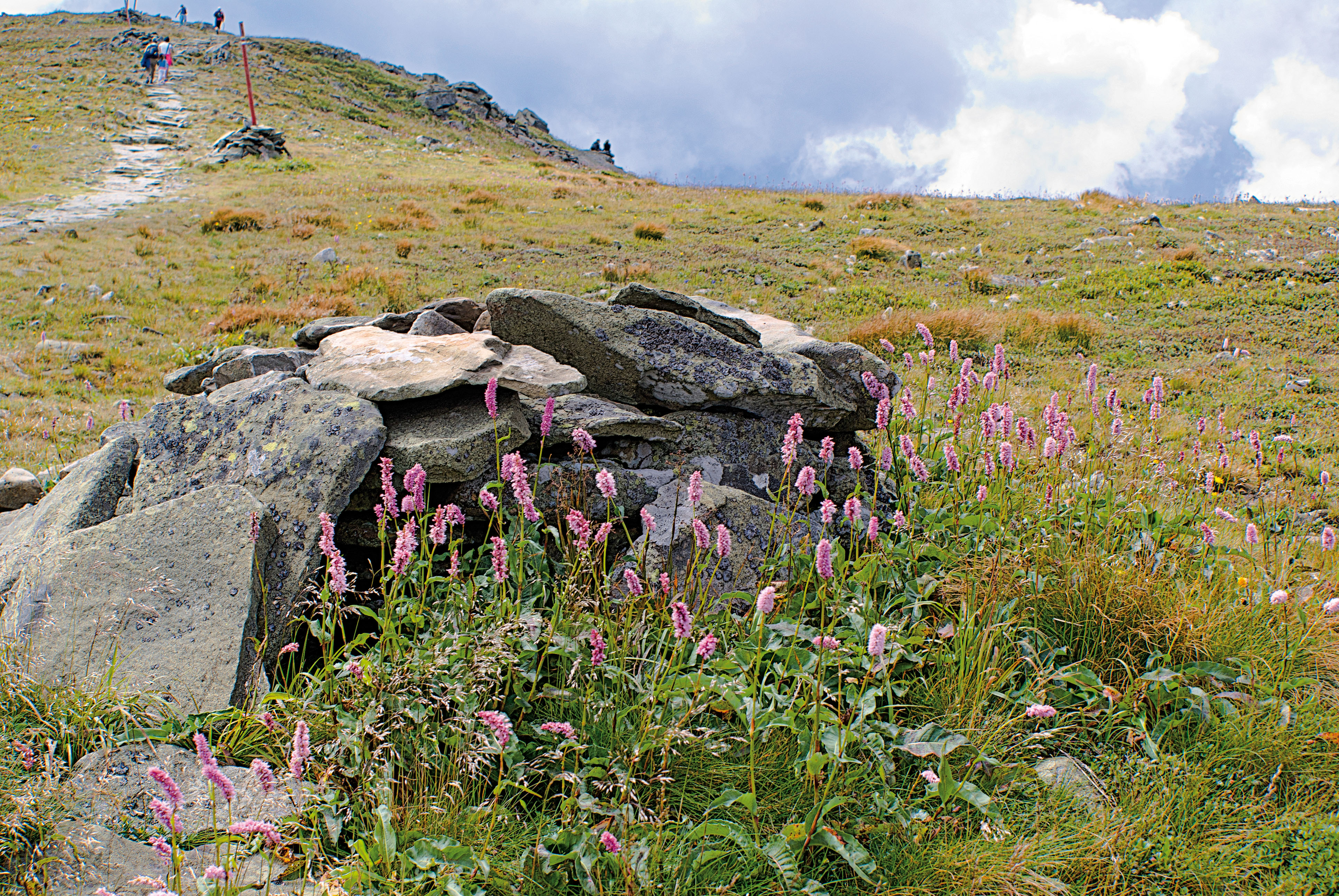 Specjalny obszar ochrony siedlisk Ostoja Babiogórska. This is a photography of Natura 2000 protected area with ID PLH120001